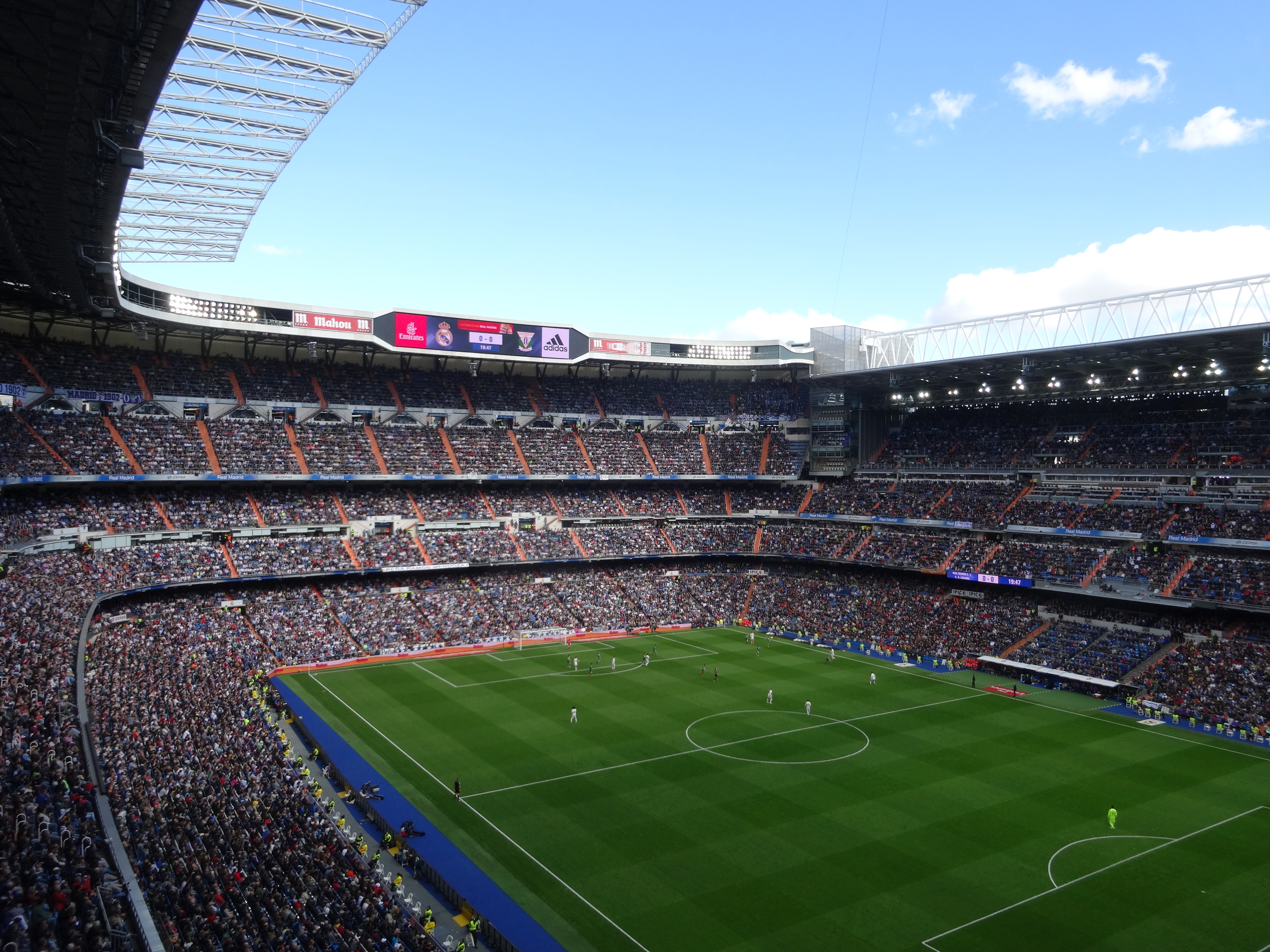 El Estadio Santiago Bernabéu durante el partido entre Real Madrid y Leganés correspondiente a la Primera División de España 2016-17.